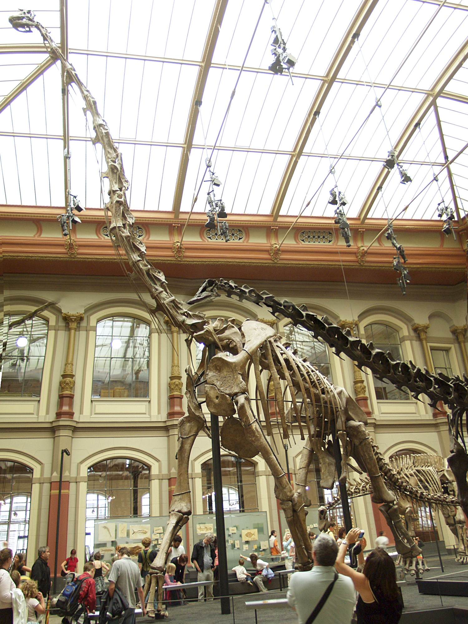 Museum für Naturkunde, Berlin: Skelett des Giraffatitan brancai